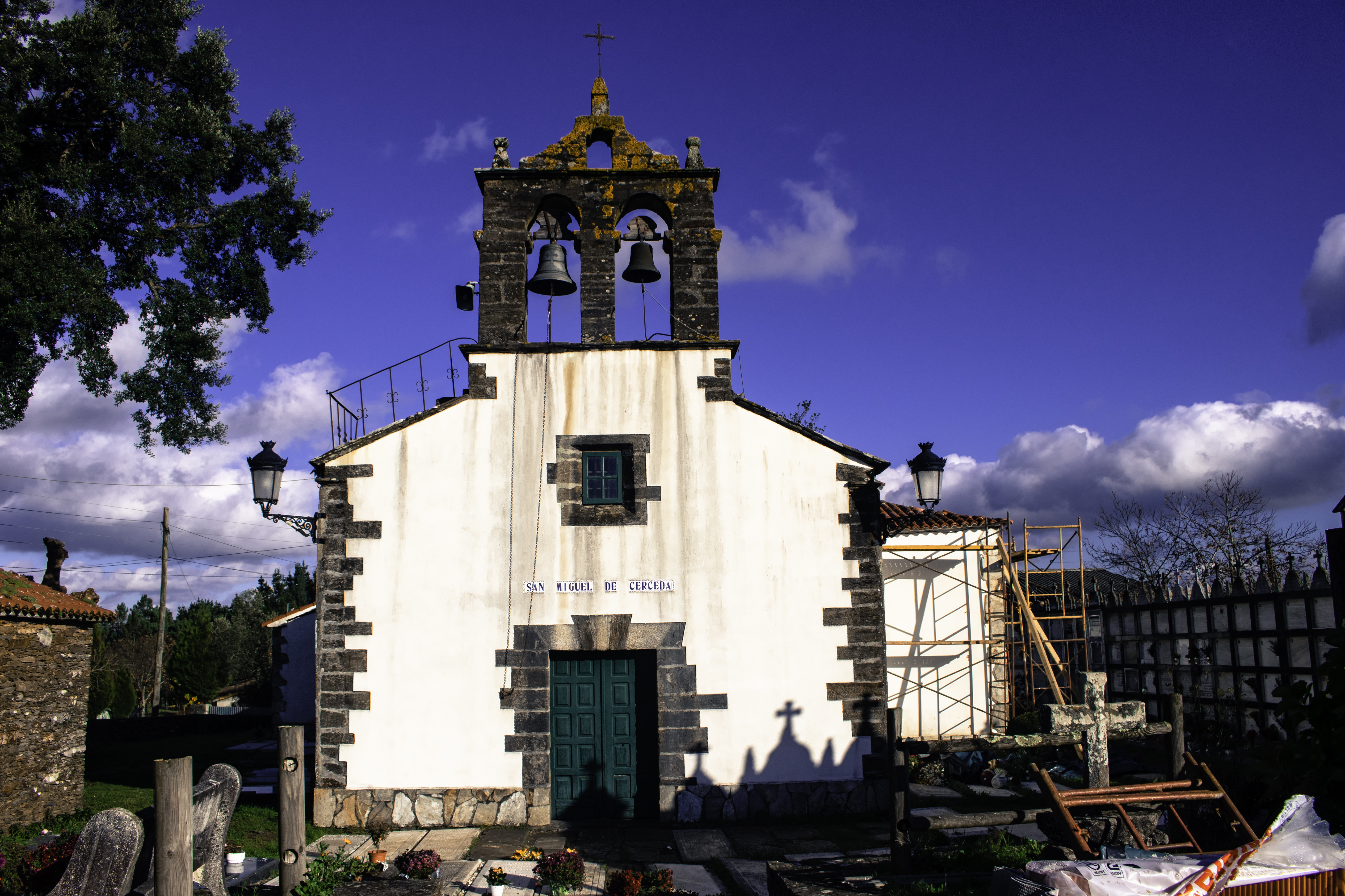 Igrexa de San Miguel de Cerceda, no concello coruñés do Pino.